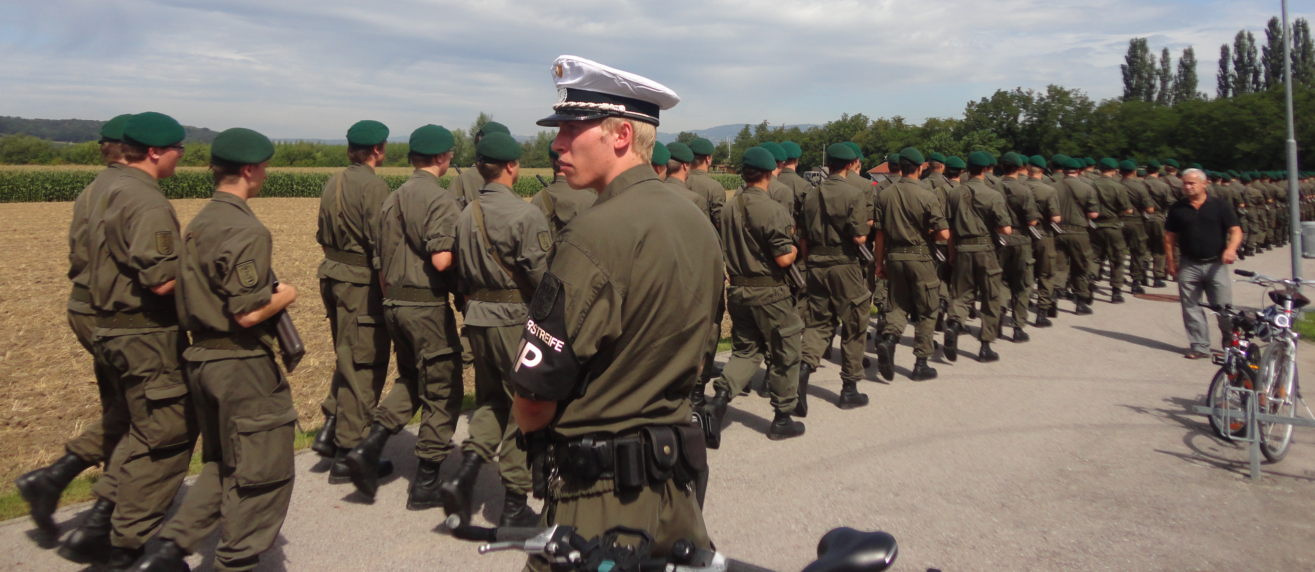 Ein Militärstreifenmann des Kommando Militärstreife & Militärpolizei beim Ordnungs- und Sicherheitsdienst im Rahmen einer Angelobung von Rekruten